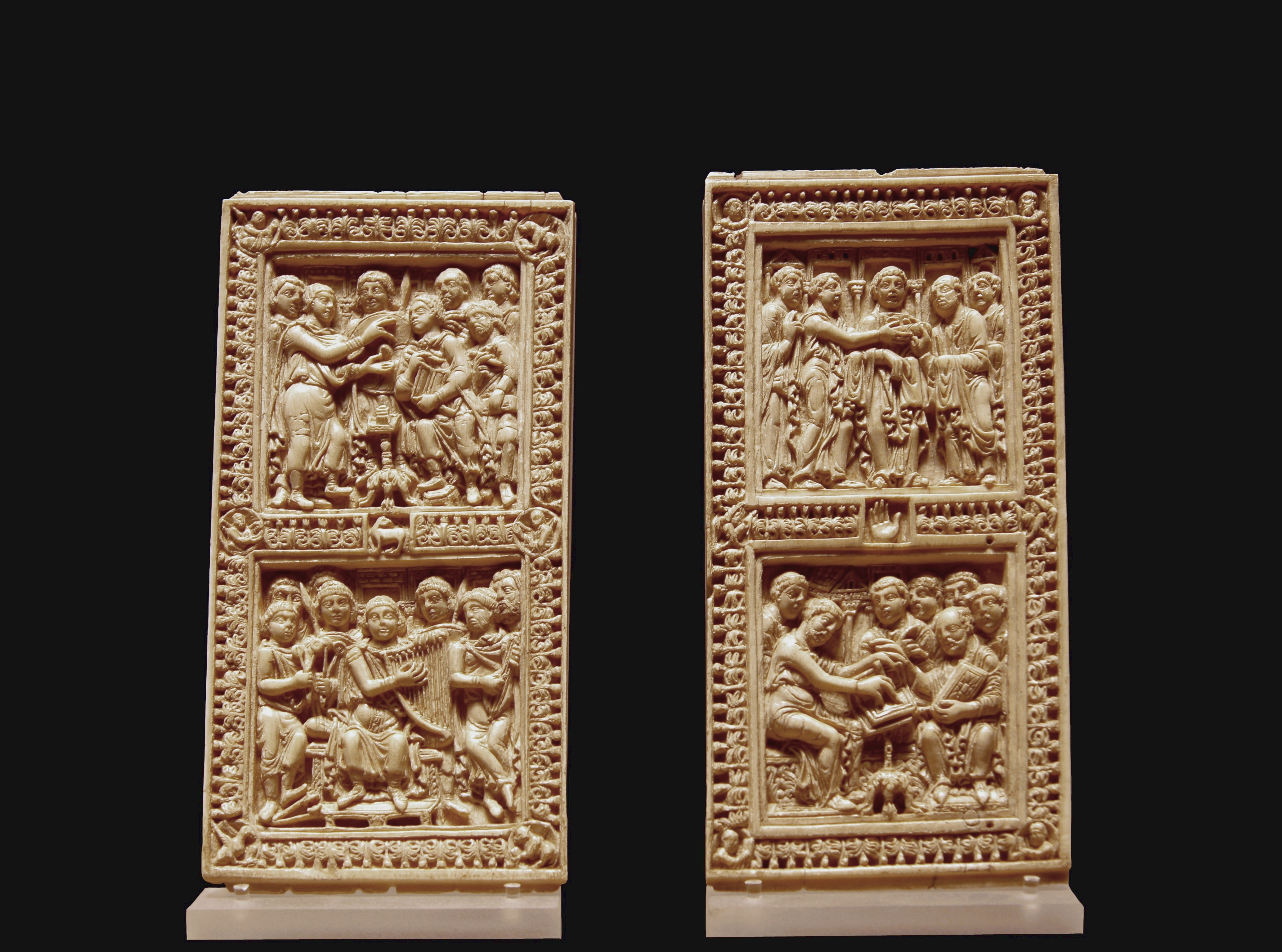 A gauche, le roi David ordonne la rédaction des psaumes et les chante. A droite, Saint Jérôme reçoit l'ordre du pape de rédiger les psaumes, puis dicte le psautier. Ces ivoires ornaient la reliure d'un psautier écrit, sur l'ordre de Charlemagne, pour le pape Adrien 1er (†795)